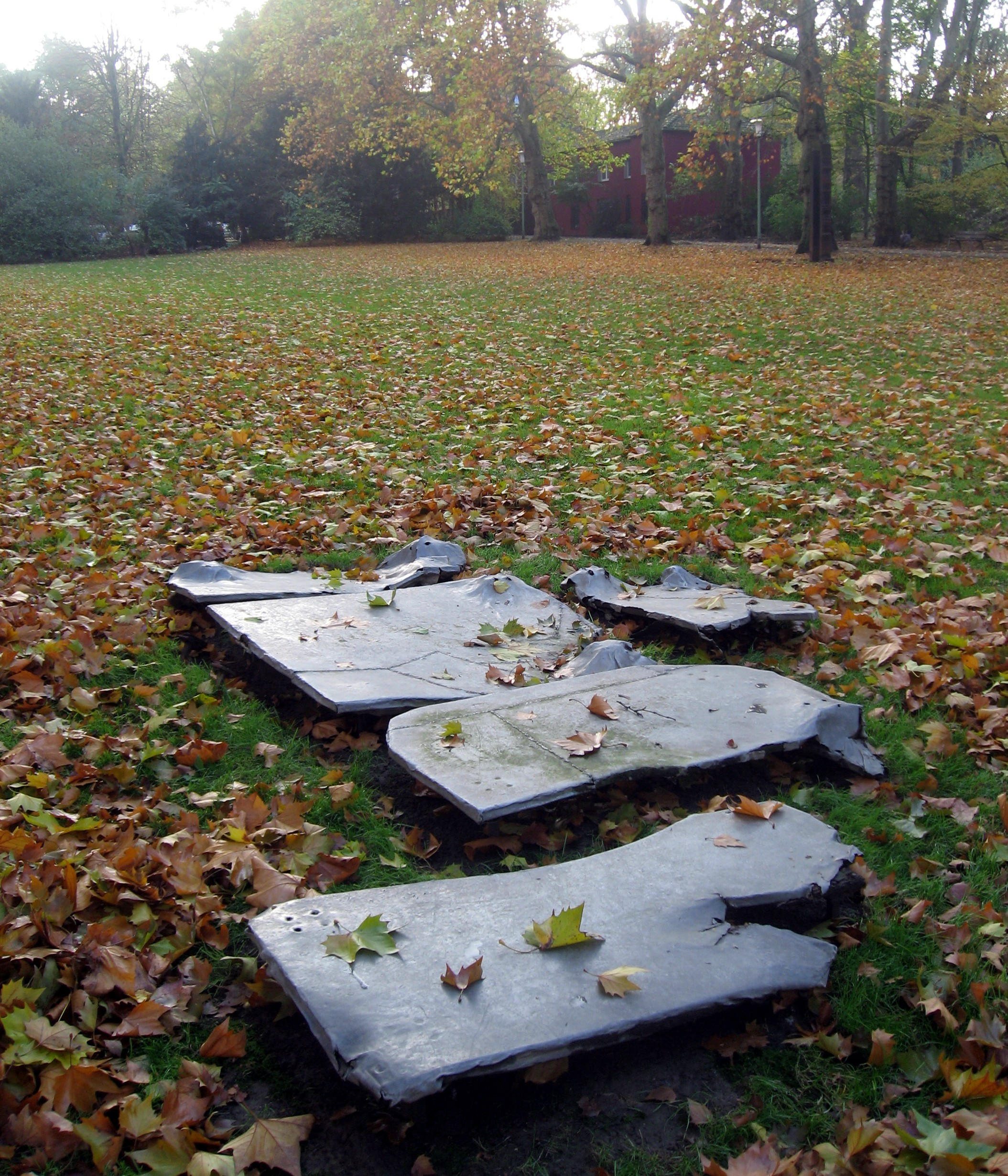 Christa Feuerberg, Bodenarbeit „ohne Titel“, 1990, Holz/Blei, 15 x 385 x 275 cm, Moltkeplatz, Essen